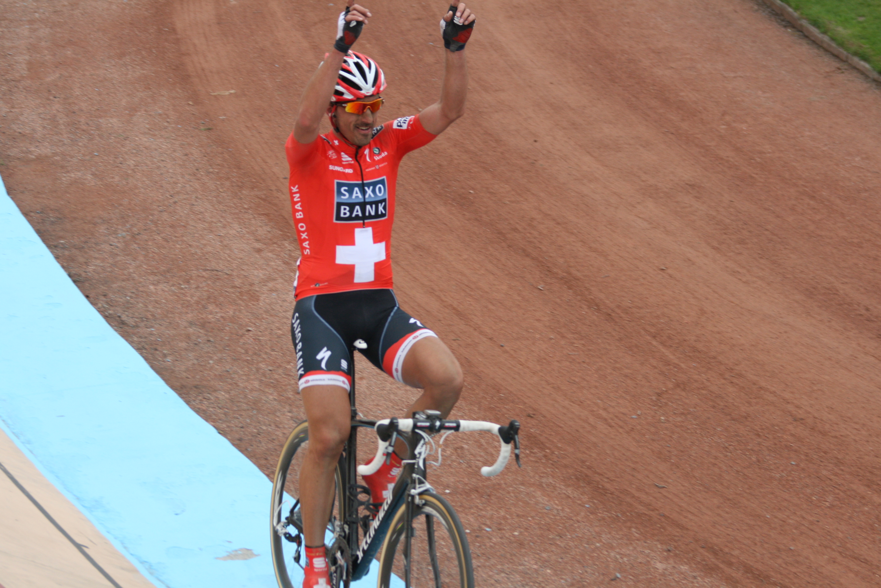 Fabian Cancellara, à l'arrivée de Paris-Roubaix 2010